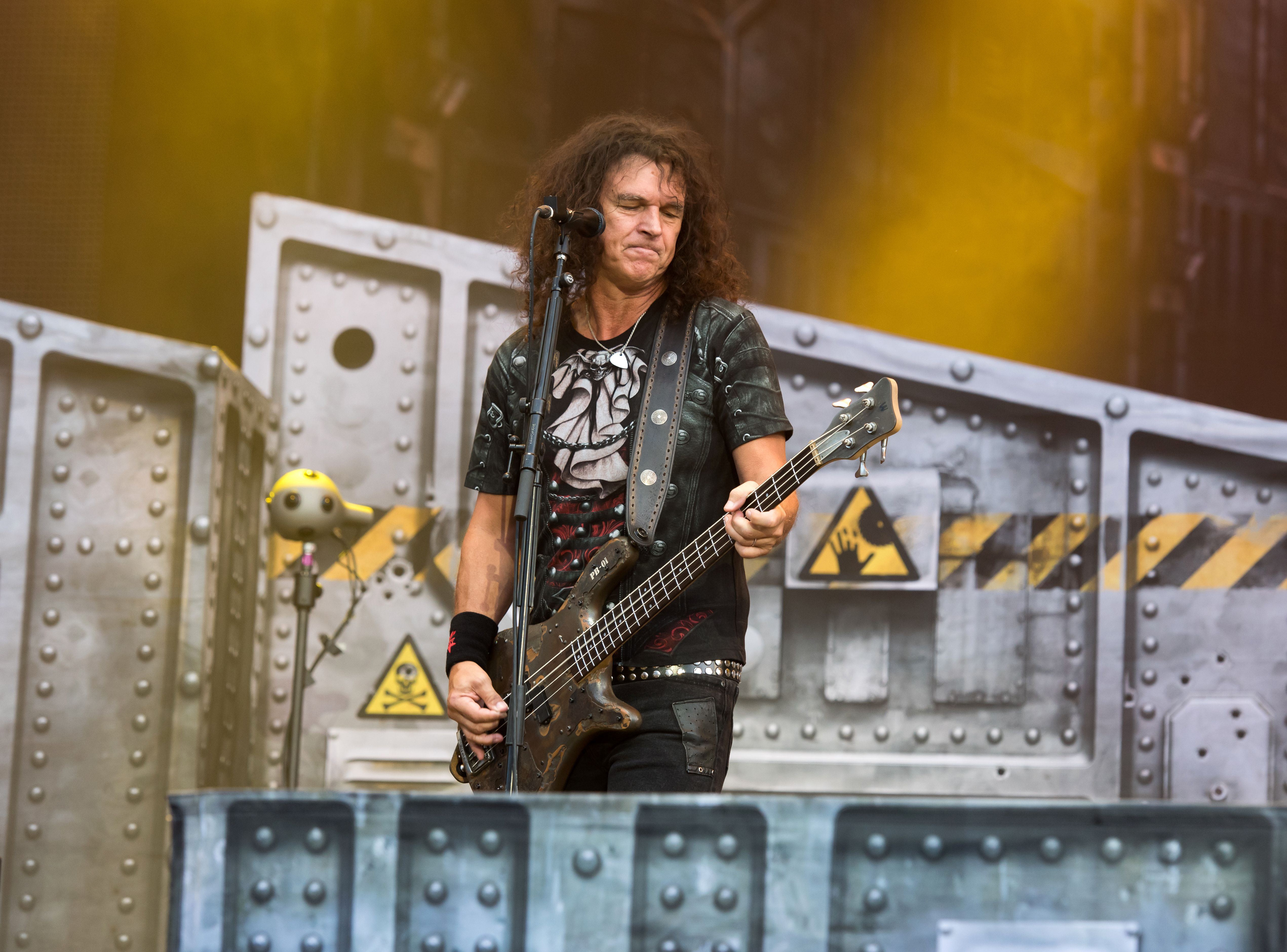 Accept beim Wacken Open Air 2017